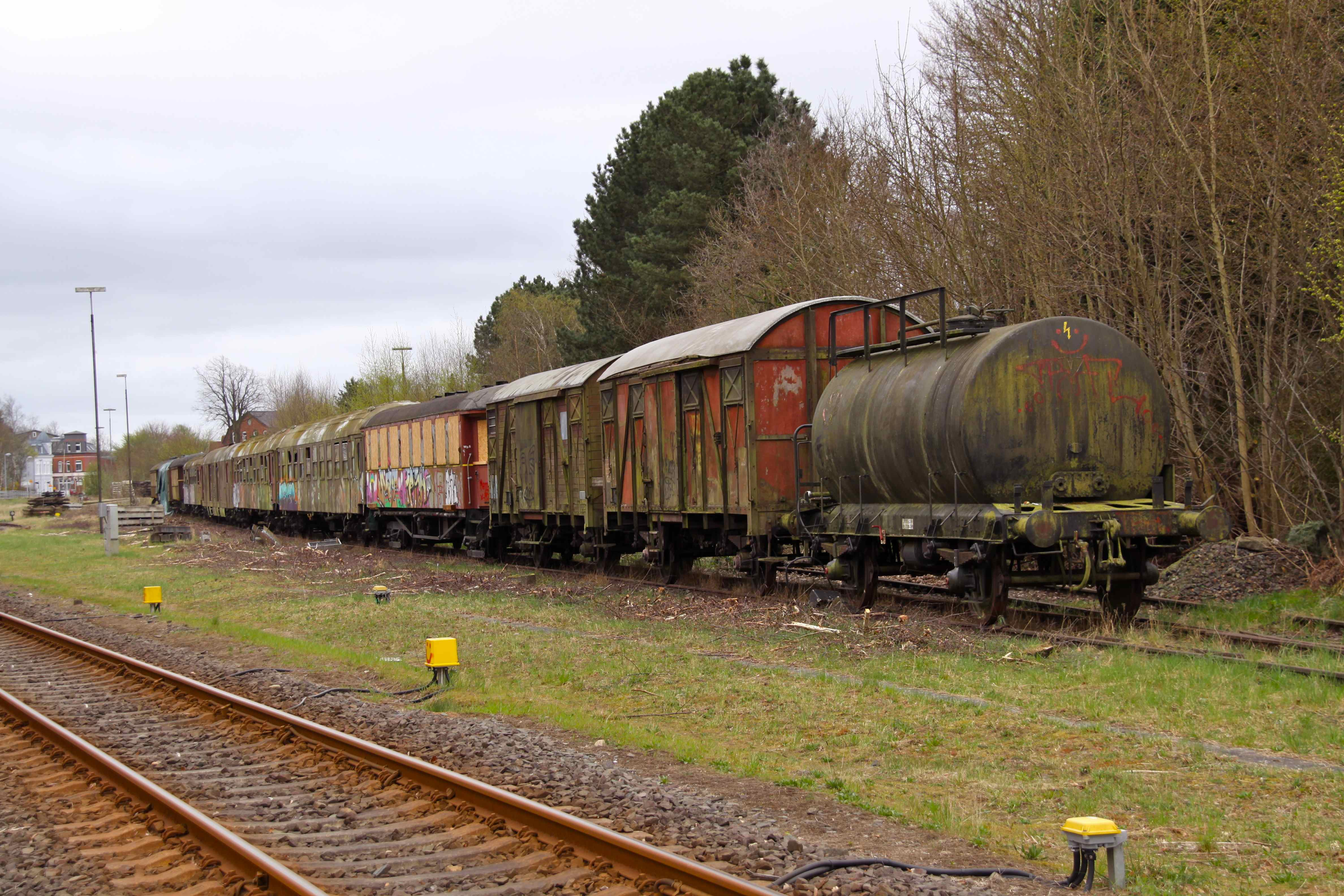 Museumsfahrzeuge Süderbrarup